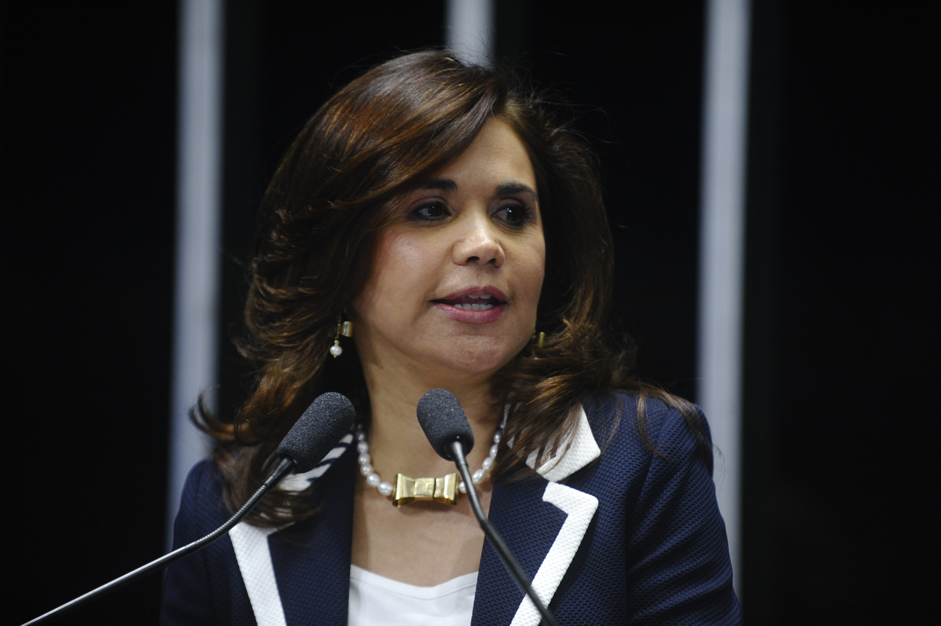 Abertura do ciclo de reuniões de comissões do Parlamento Latino-Americano (Parlatino) 2015. Em discurso, a presidente do Parlamento Latino-Americano (Parlatino), senadora do México, Blanca Alcalá. Foto: Marcos Oliveira/Agência Senado